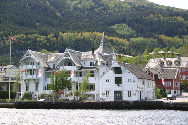 Norheimsund - Sandven Hotel